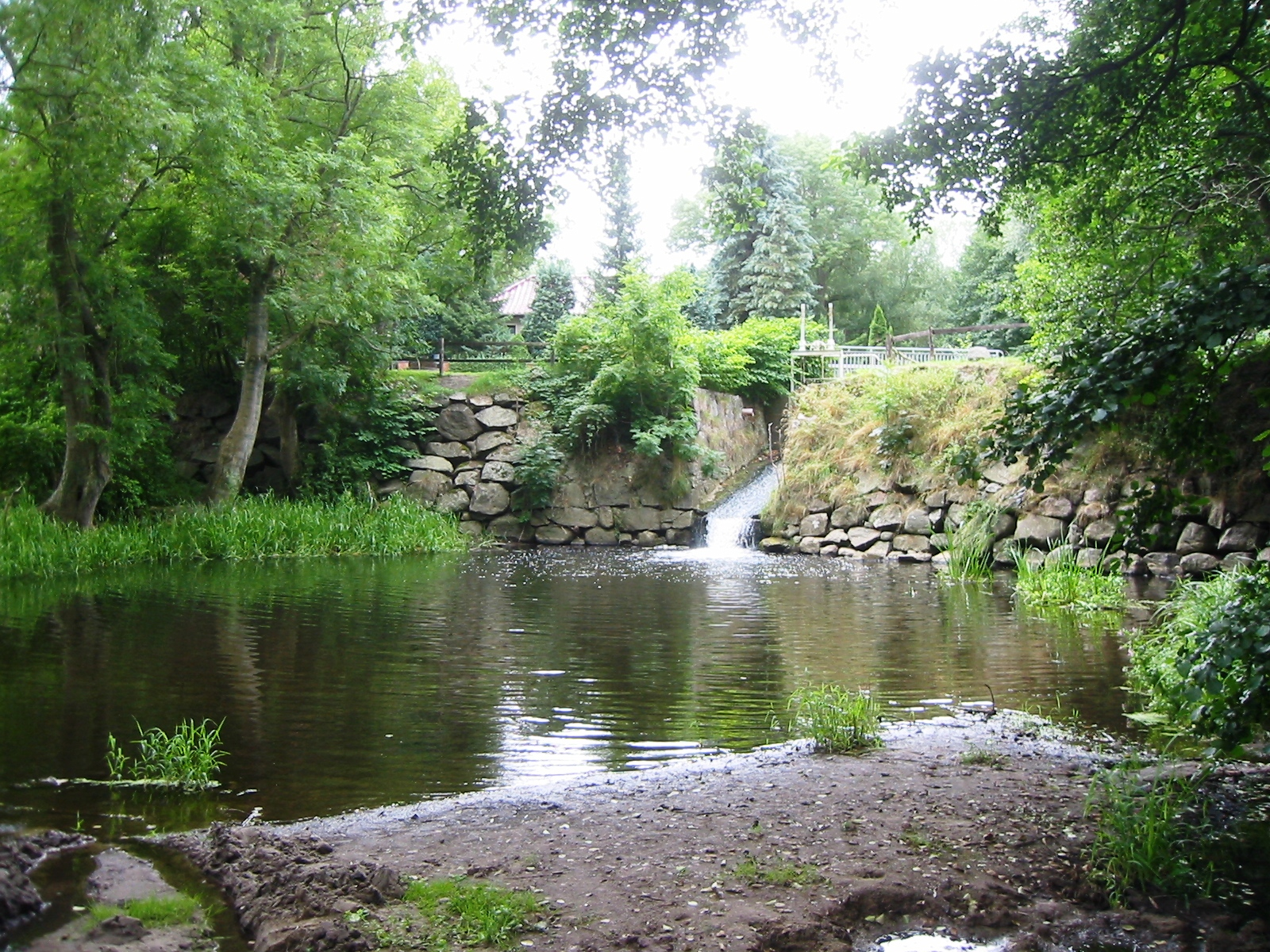 Blick auf den Wasserfall der Kemnitz in der gleichnamigen Gemeinde bei Greifswald (Vorpommern-Greifswald, Mecklenburg-Vorpommern)